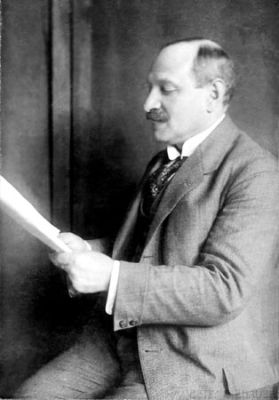 Hugo Haase im Jahre 1905